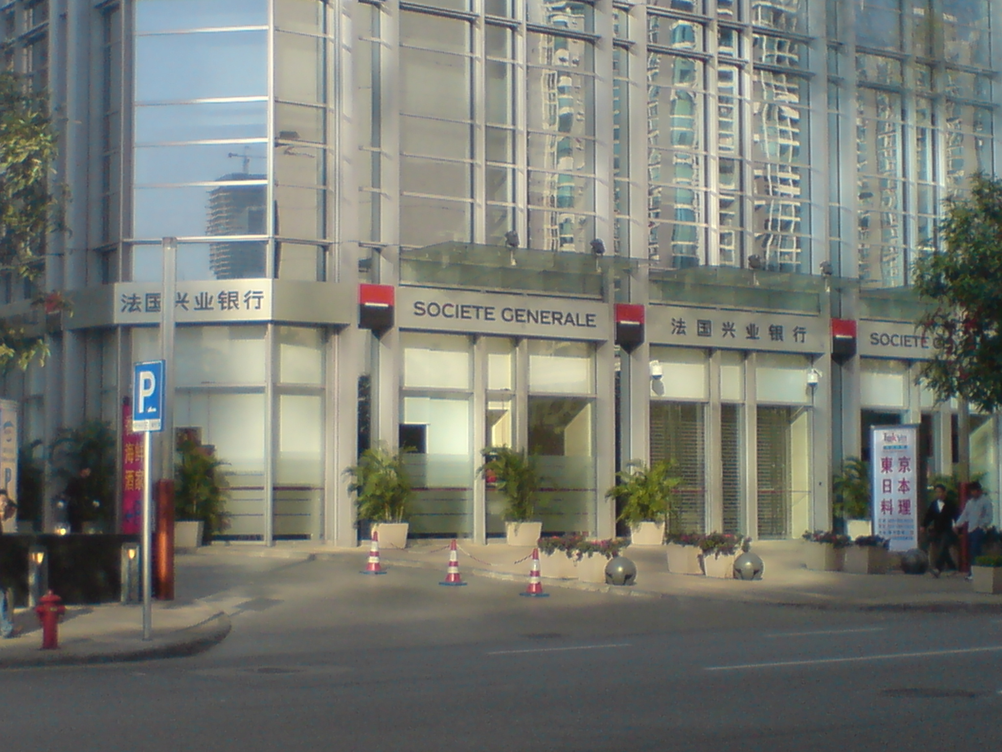 法国兴业银行在广州天河区林和西路的一分行